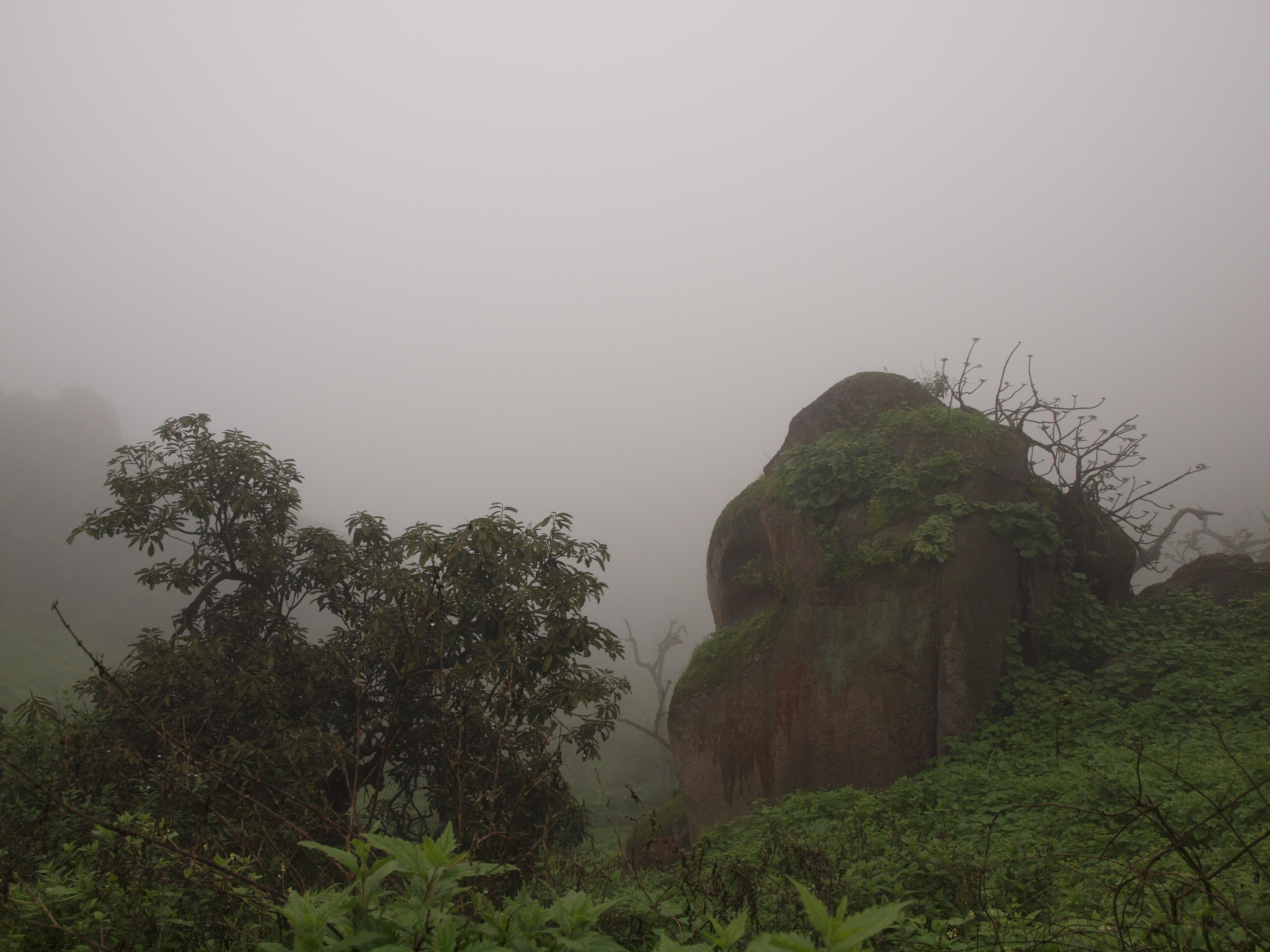 Vista de la RN Lomas de Lachay, Lima, Perú